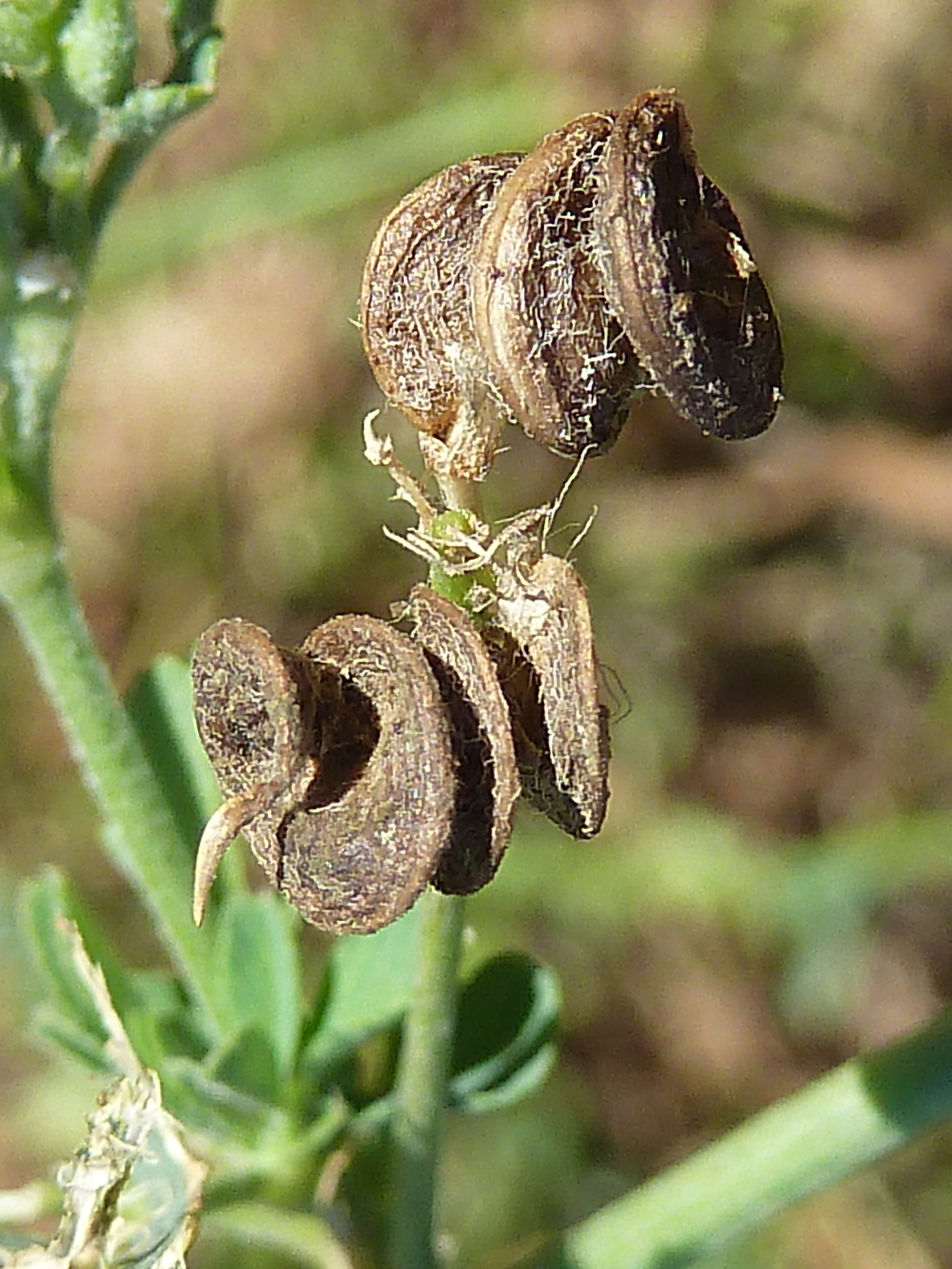 Medicago sativa sativa (Alfalfa): frutos maduros en 'sacacorcho' siniestro - Albatera (Alicante, España).